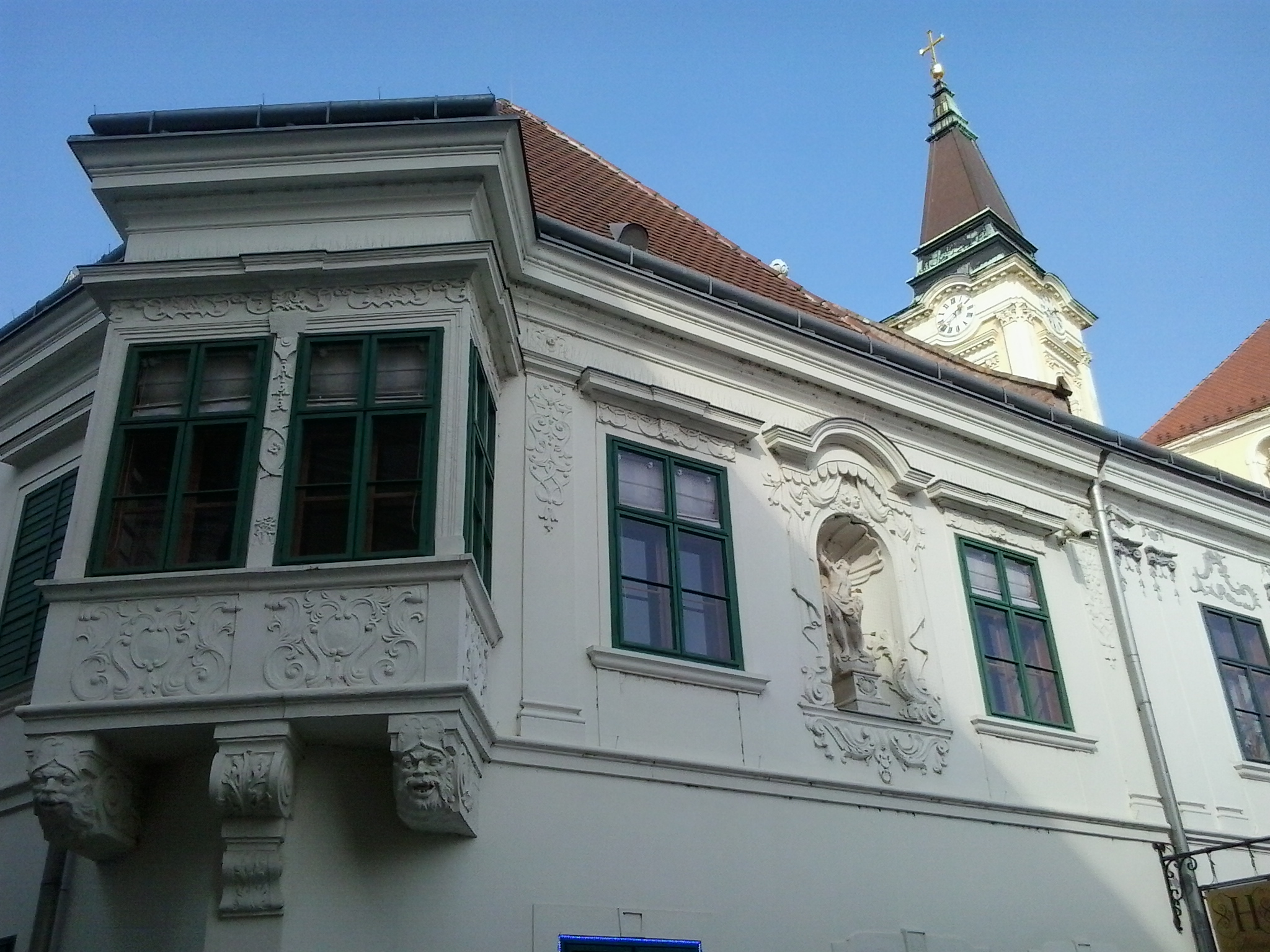 A székesfehérvári Hiemer-Pfund-Caraffa épületegyüttes Városház téri homlokzata. -Ún. Hiemer-ház, egykori belvárosi plébánia, rokokó, 1760-1770. Homlokzatán fülkében Szt. Sebestyén-szobor, 18. sz. második fele. Jelenleg rendezvényközpont (2010). -Székesfehérvár, Jókai u. 1